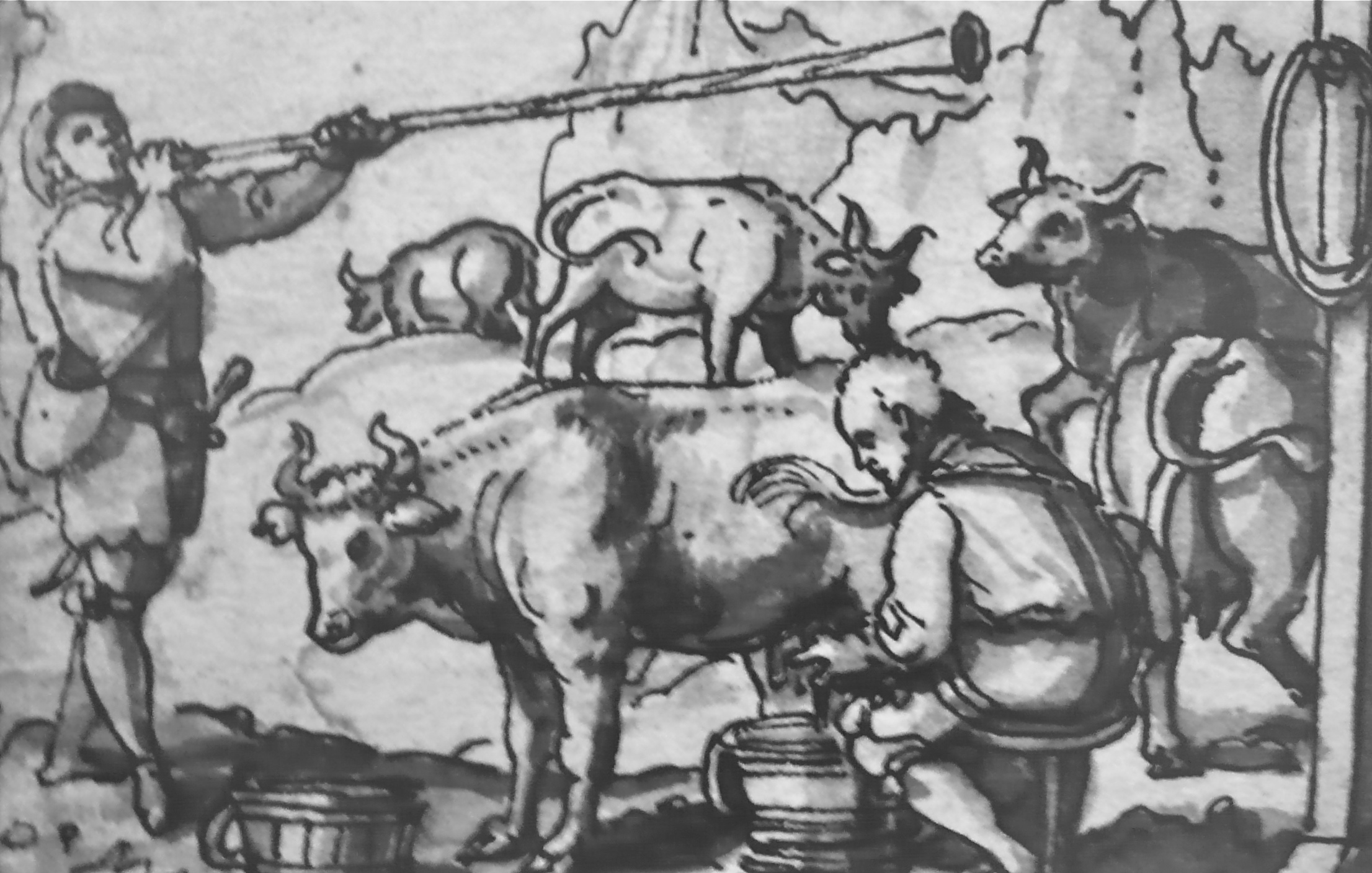 Tiba spielender Hirte; Federzeichnung von 1601; Daniel Lindtmayer d.J. (1552-1606/07)